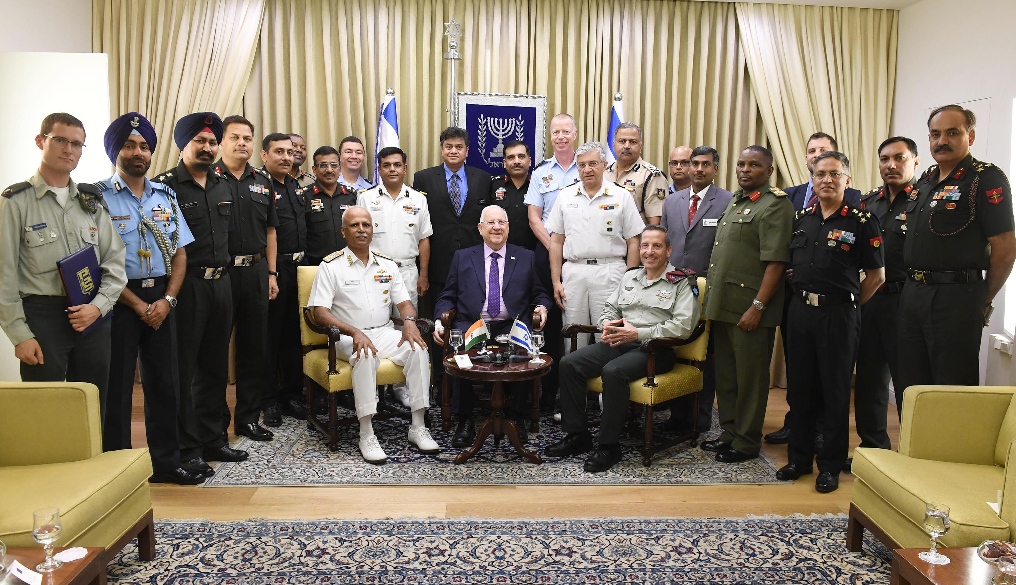 . ראובן ריבלין נשיא מדינת ישראל בפגישה עם משלחת המכללה לביטחון לאומי ההודית. מימינו הקצין הישראלי אמיר ברעם.